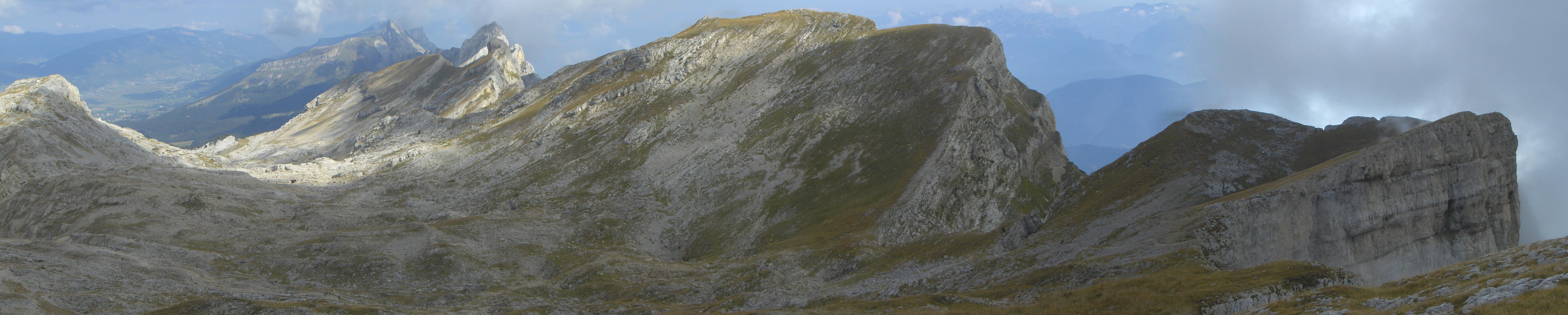 photo du vallon du clot d'aspres